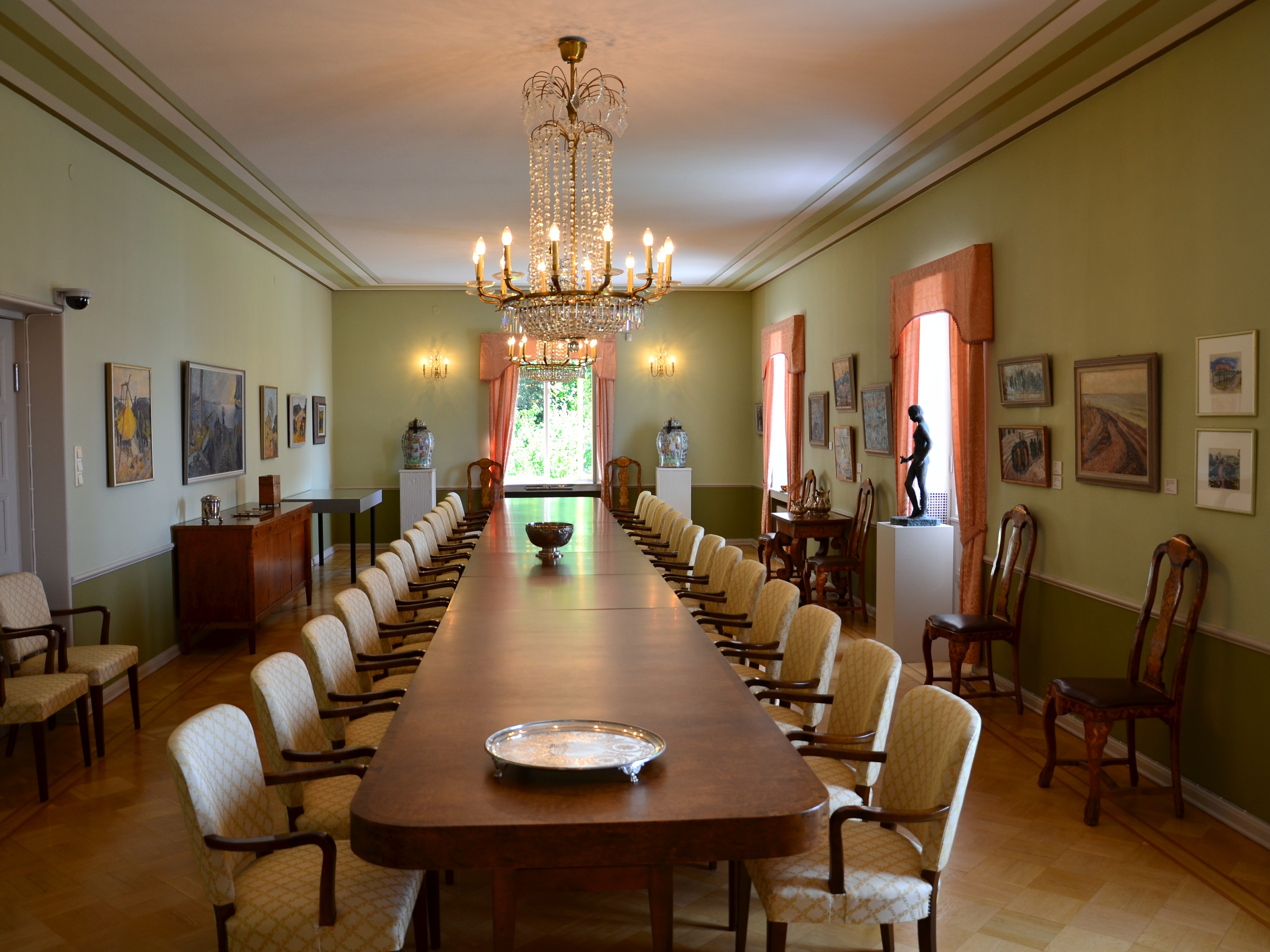 Stora matsalen, Söderlångvik, Finland. Söderlångvik manor Native nameSöderlångviks museumParent institutionAmos Anderson Art MuseumLocationKimito island, FinlandCoordinates60° 02′ 00″ N, 22° 26′ 00″ E Established1961Web page control : Q6581530 institution QS:P195,Q6581530